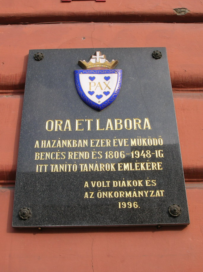 Bencés emléktábla a Türr István Gimnázium falán, Pápa